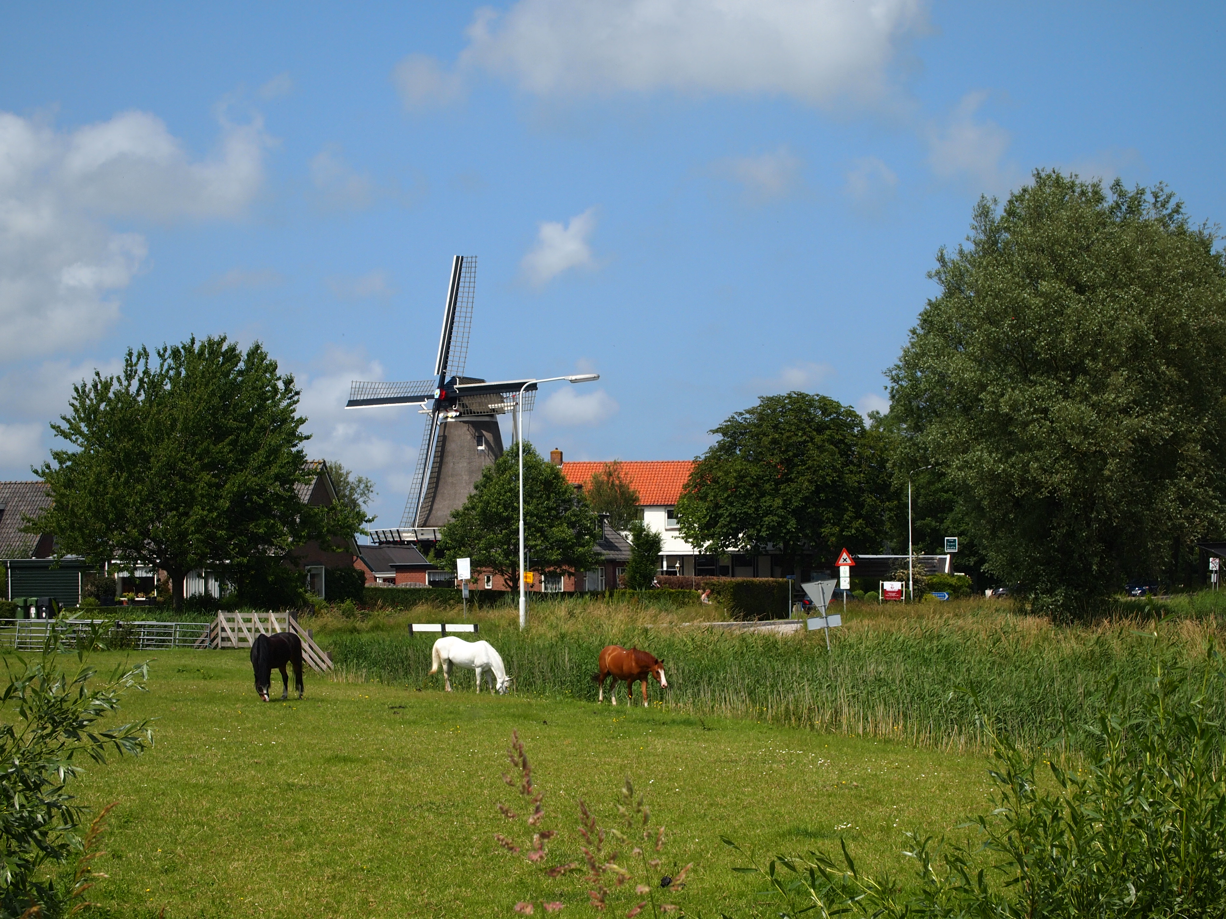 Vrouwbuurstermolen